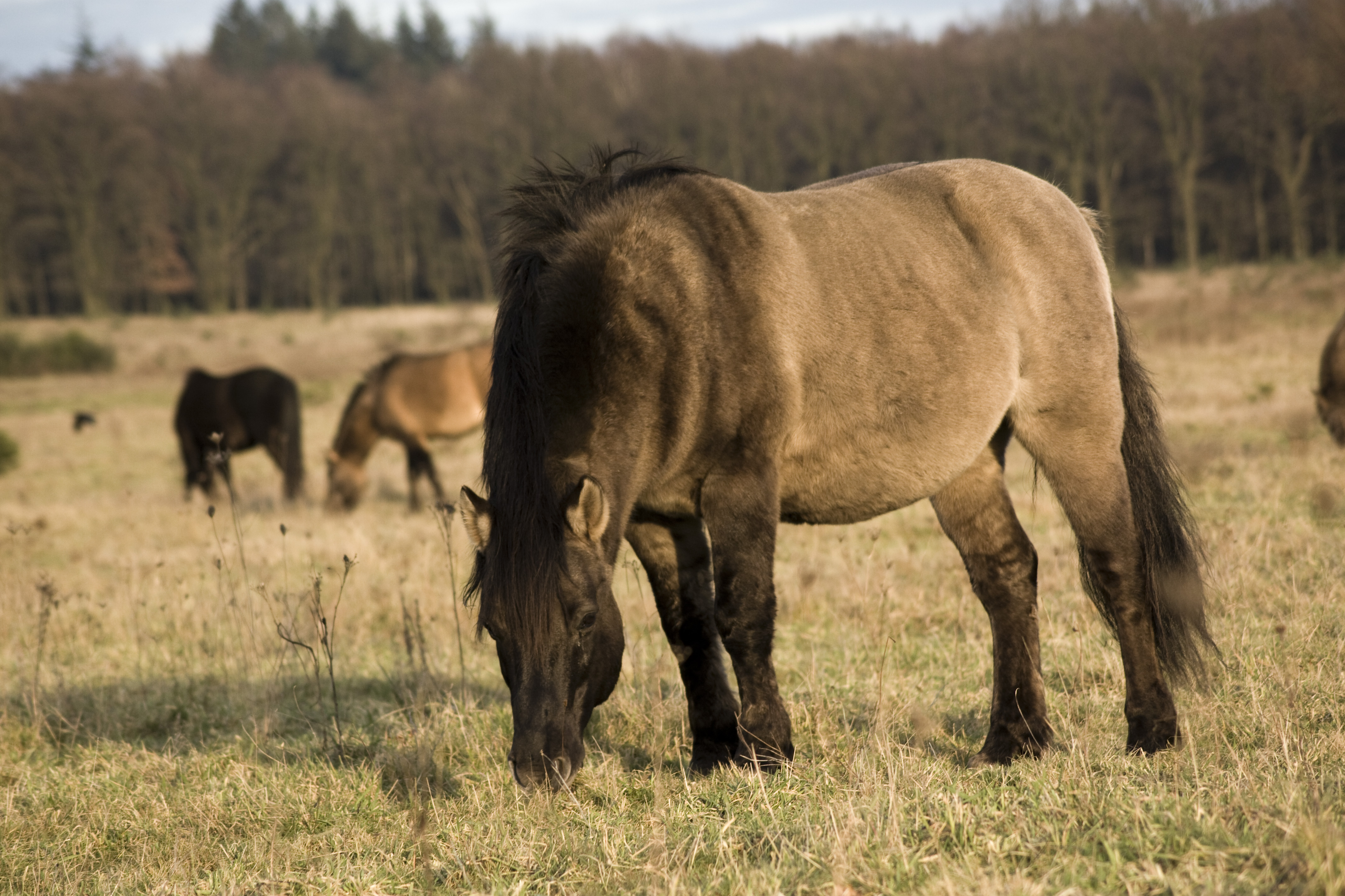 Konik grazing.